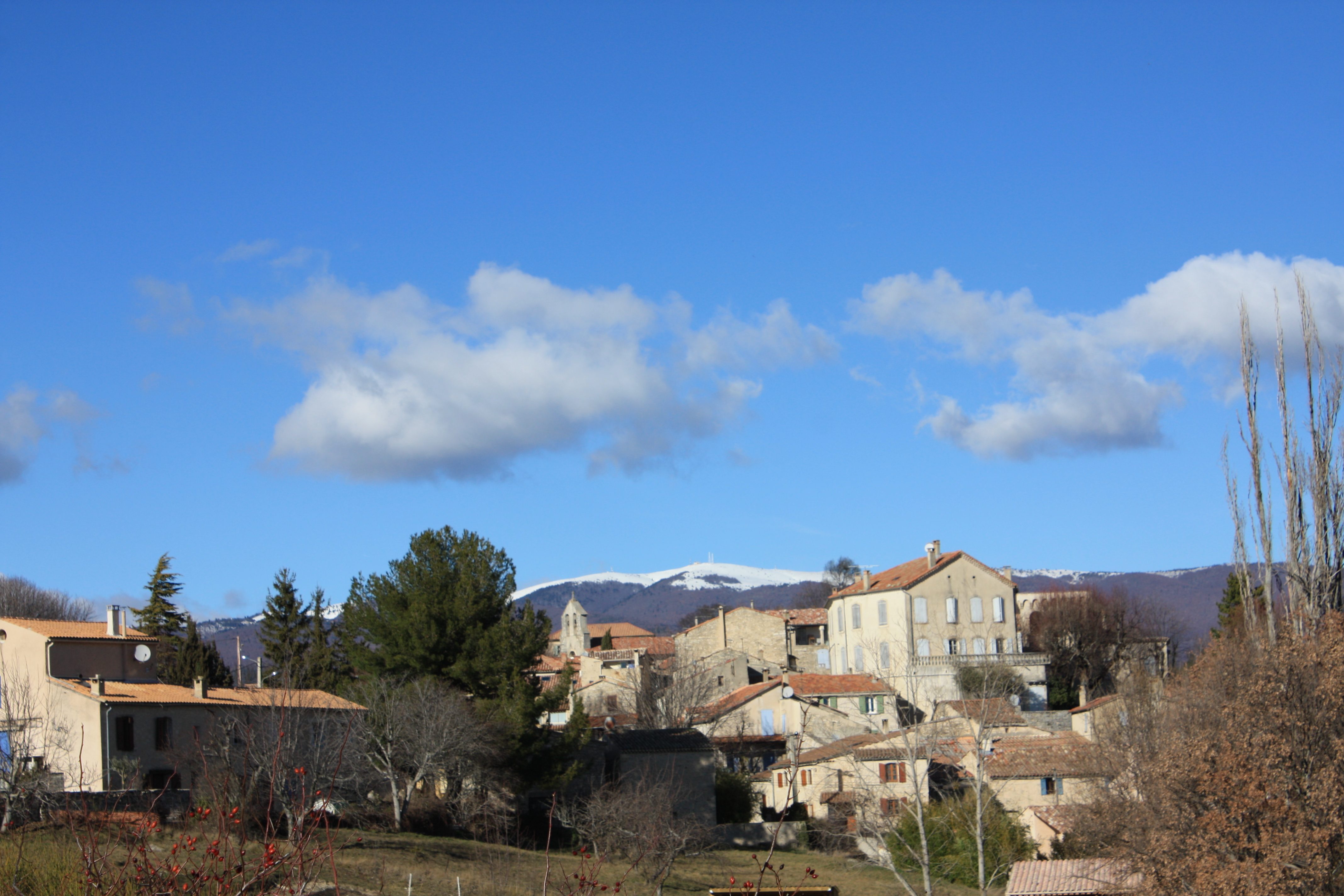 Village de Fontienne (Alpes-de-Haute-Provence) = premier plan. Montagne de Lure = second plan.